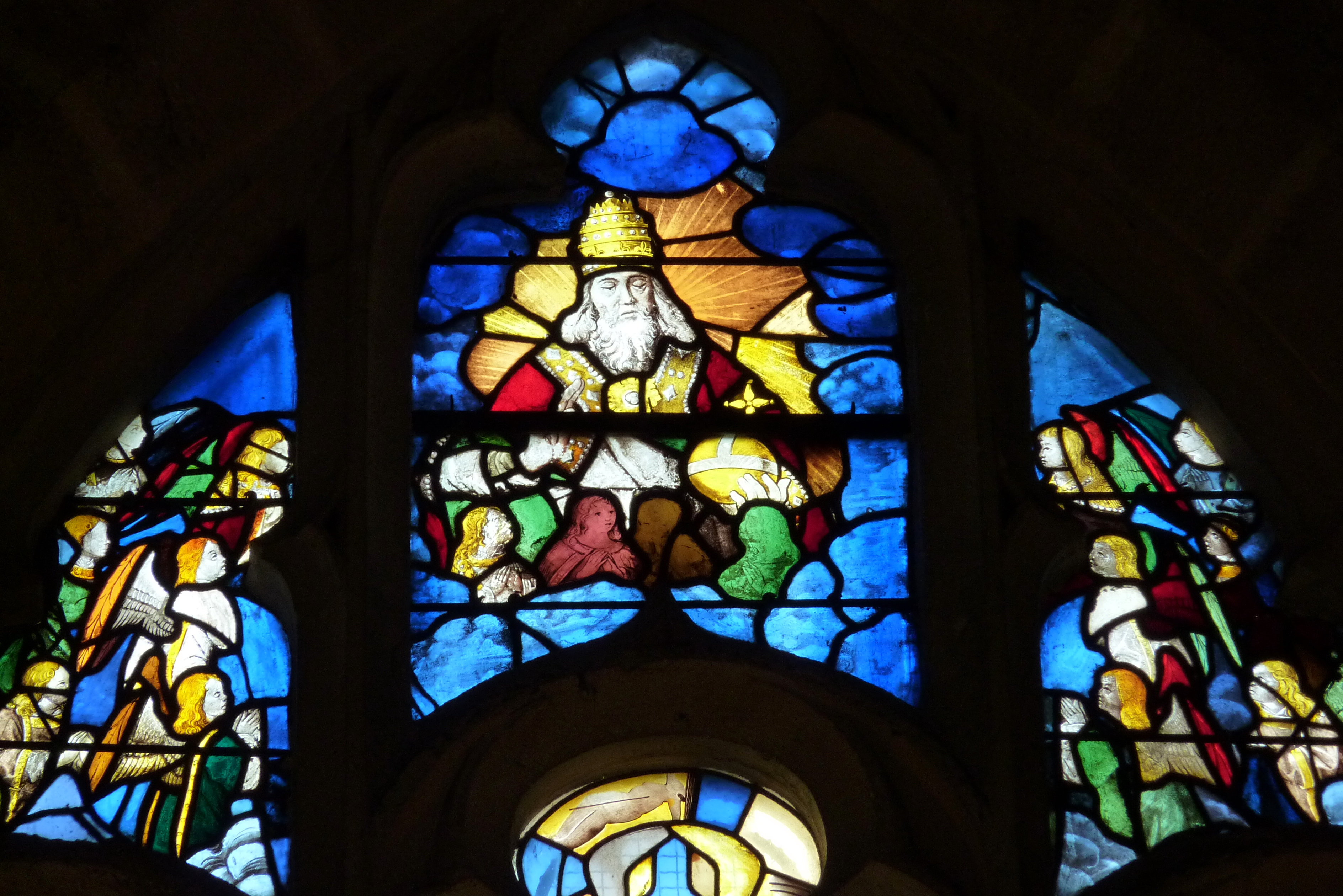 Bleiglasfenster (Ausschnitt) in der katholischen Kirche Notre-Dame-de-Pitié in Puteaux